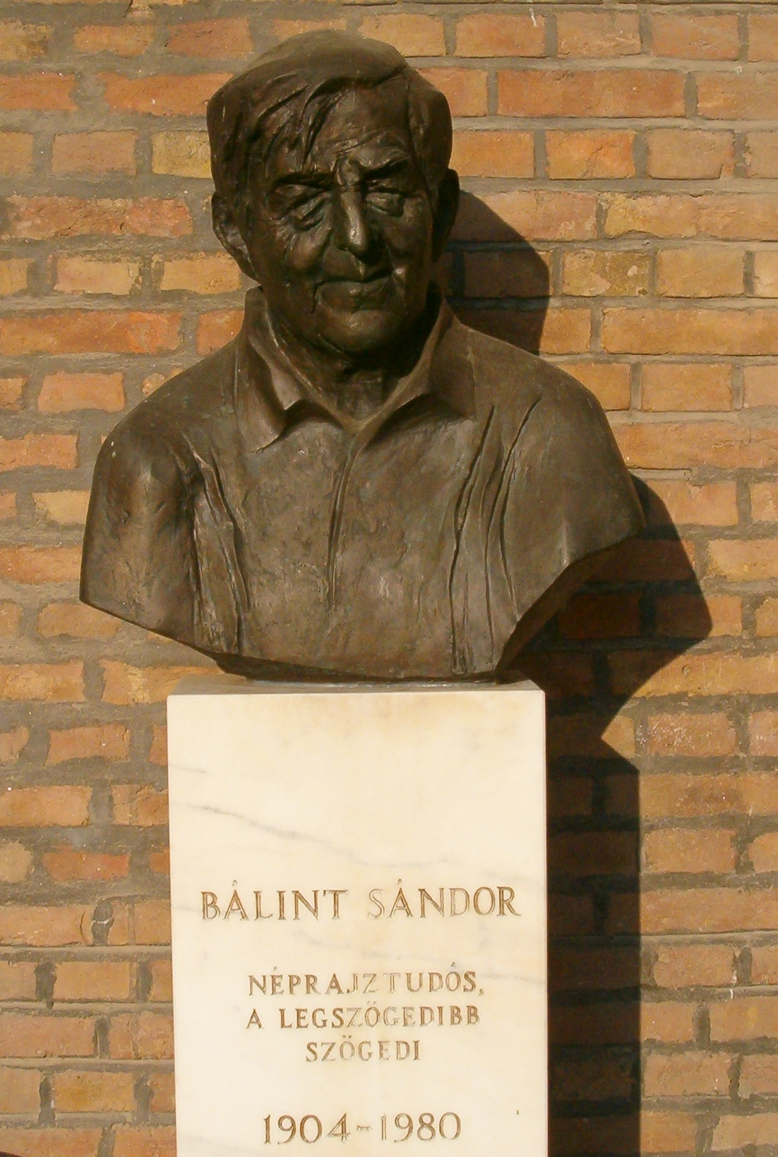 Bálint Sándor néprajzkutató szobra a szegedi Pantheonban. self-taken photo in Szeged, 2005 – Váradi Zsolt 23:22, 13 November 2005 (UTC)